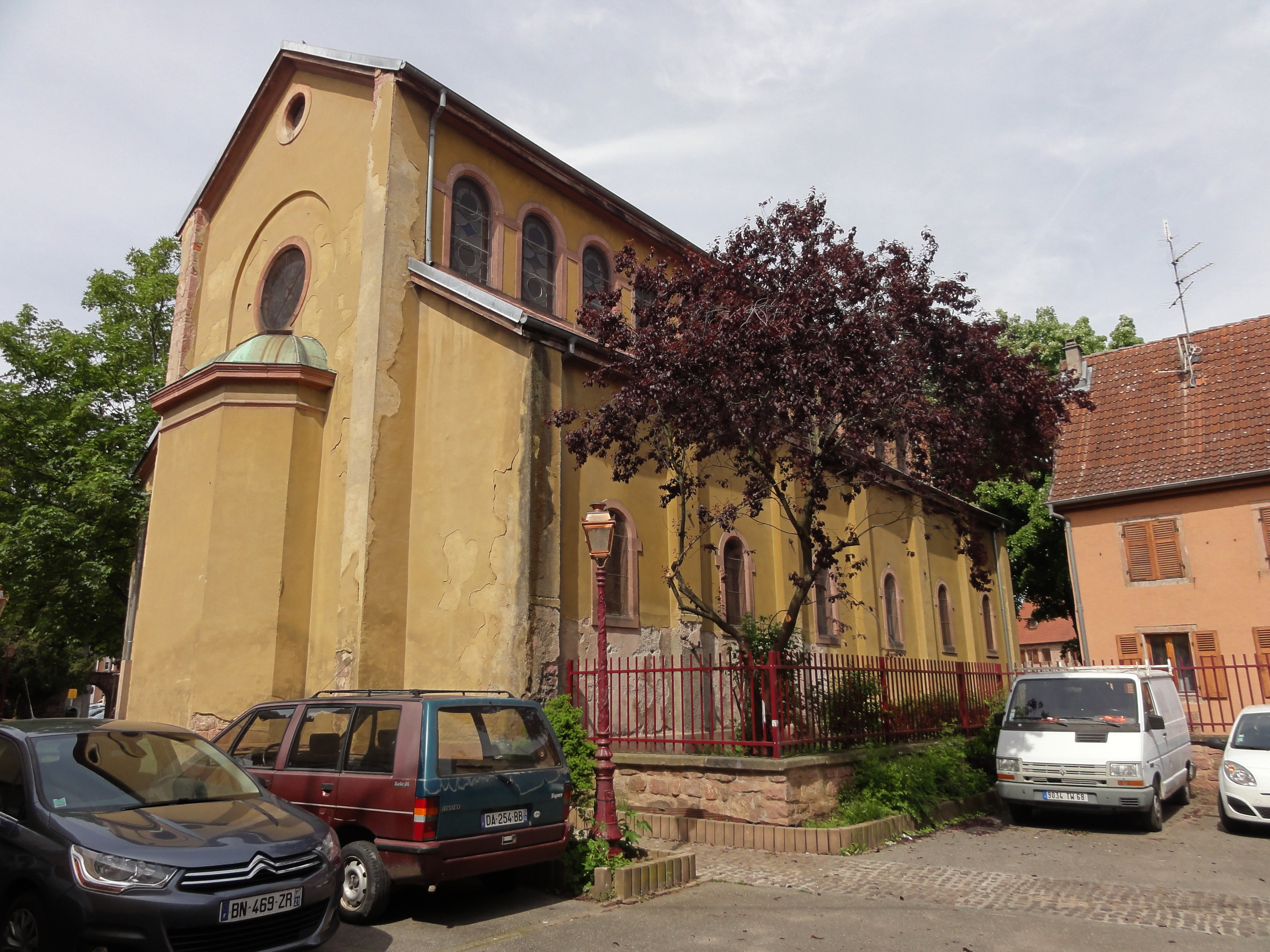 Alsace, Haut-Rhin, Guebwiller, Synagogue (1869), rue de l'Ancien-Hôpital.